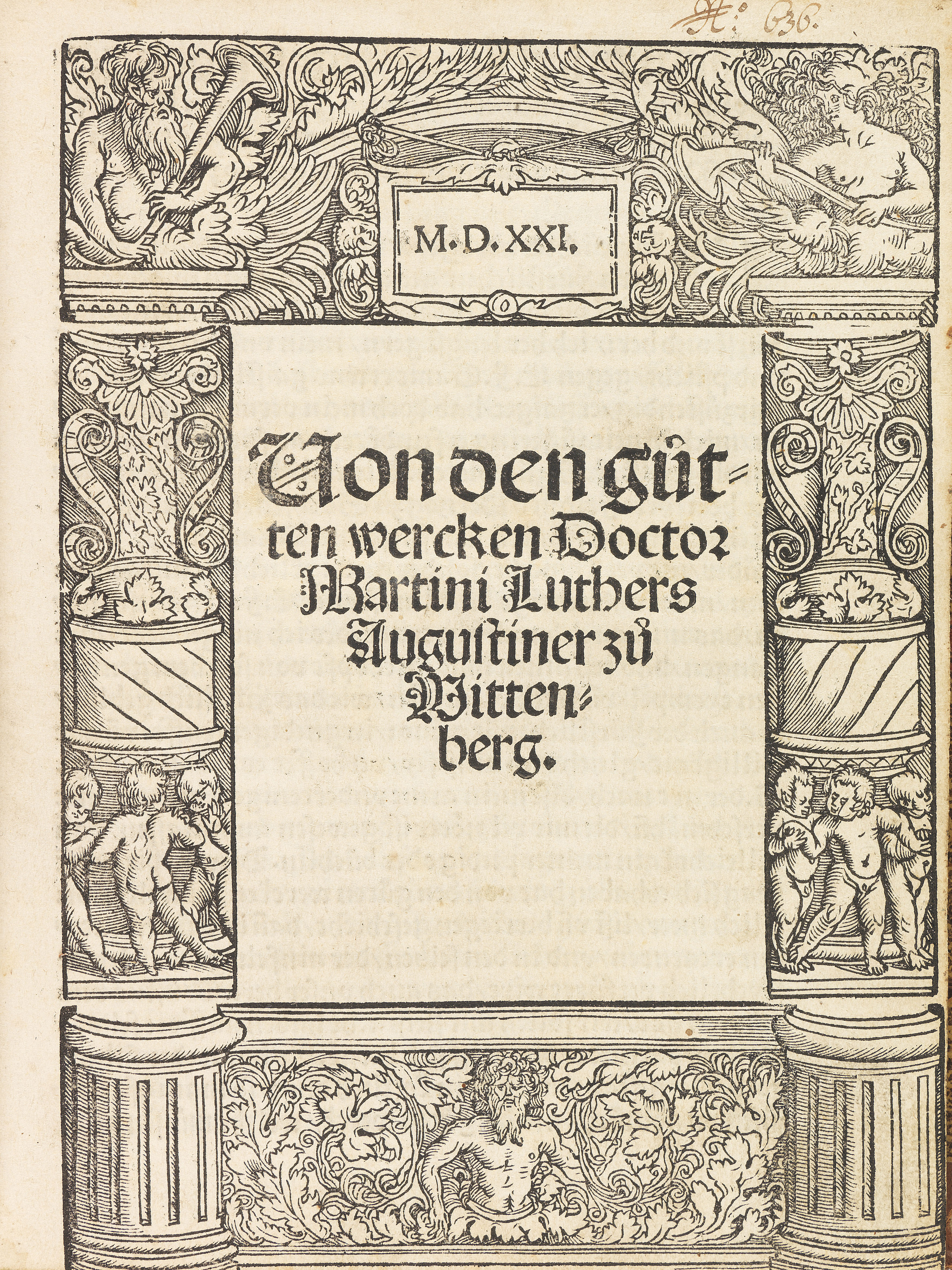 Martin Luther: Von den gutten wercken. [Augsburg, S. Otmar] 1521. Holzschnitt-Titelbordüre von Hans Weiditz.